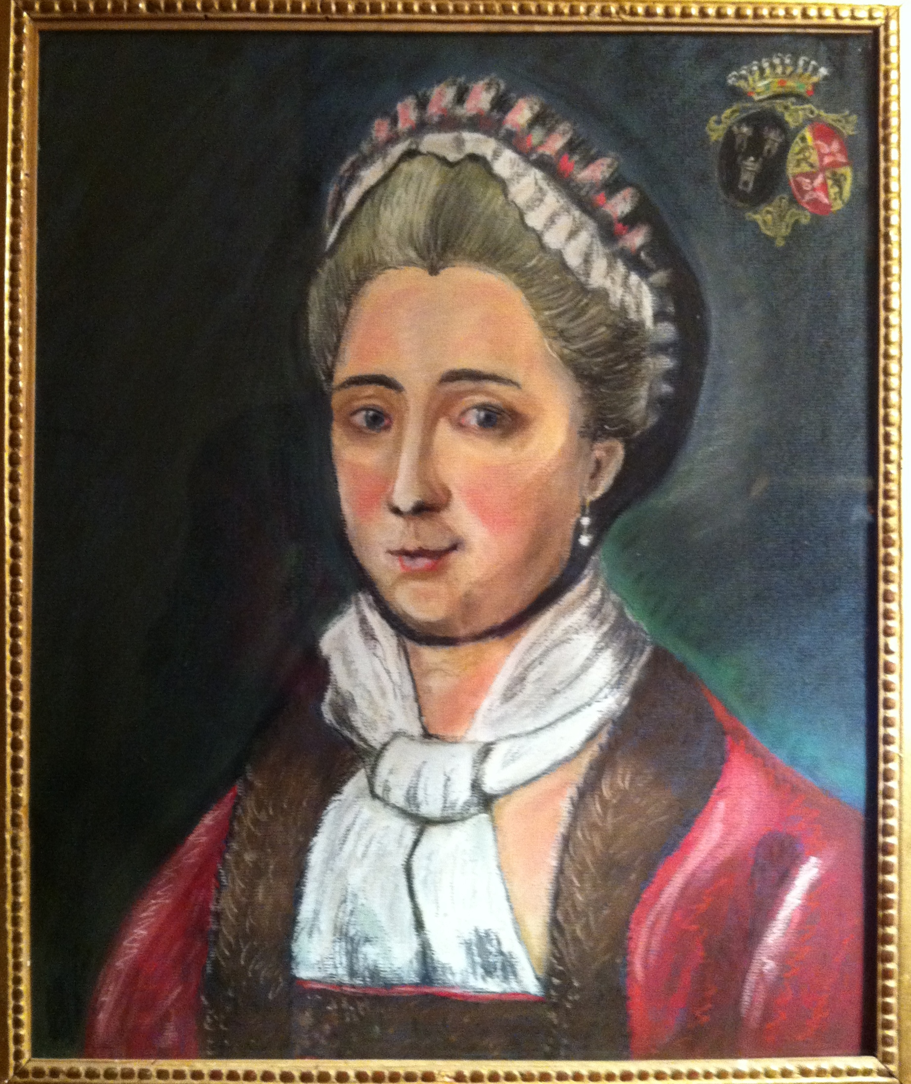 Ctesse de Lavaulx née Guitaut, copie par A de Lavaulx